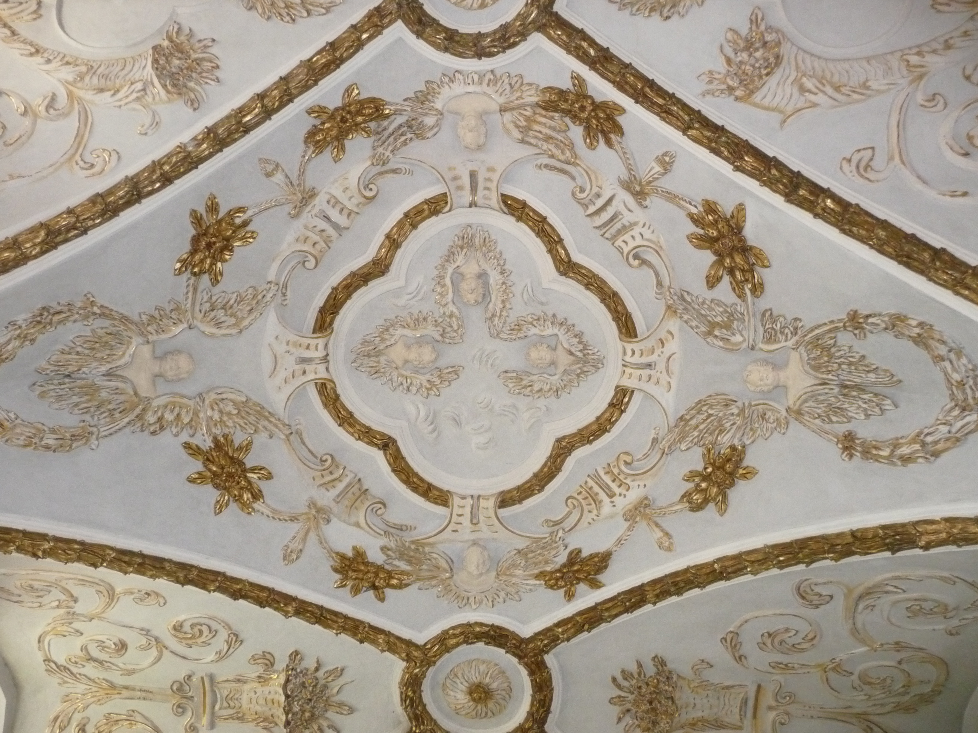 Ausschnitt aus den Stuckarbeiten im Chorraum in der Sparnecker Kirche St. Vitus